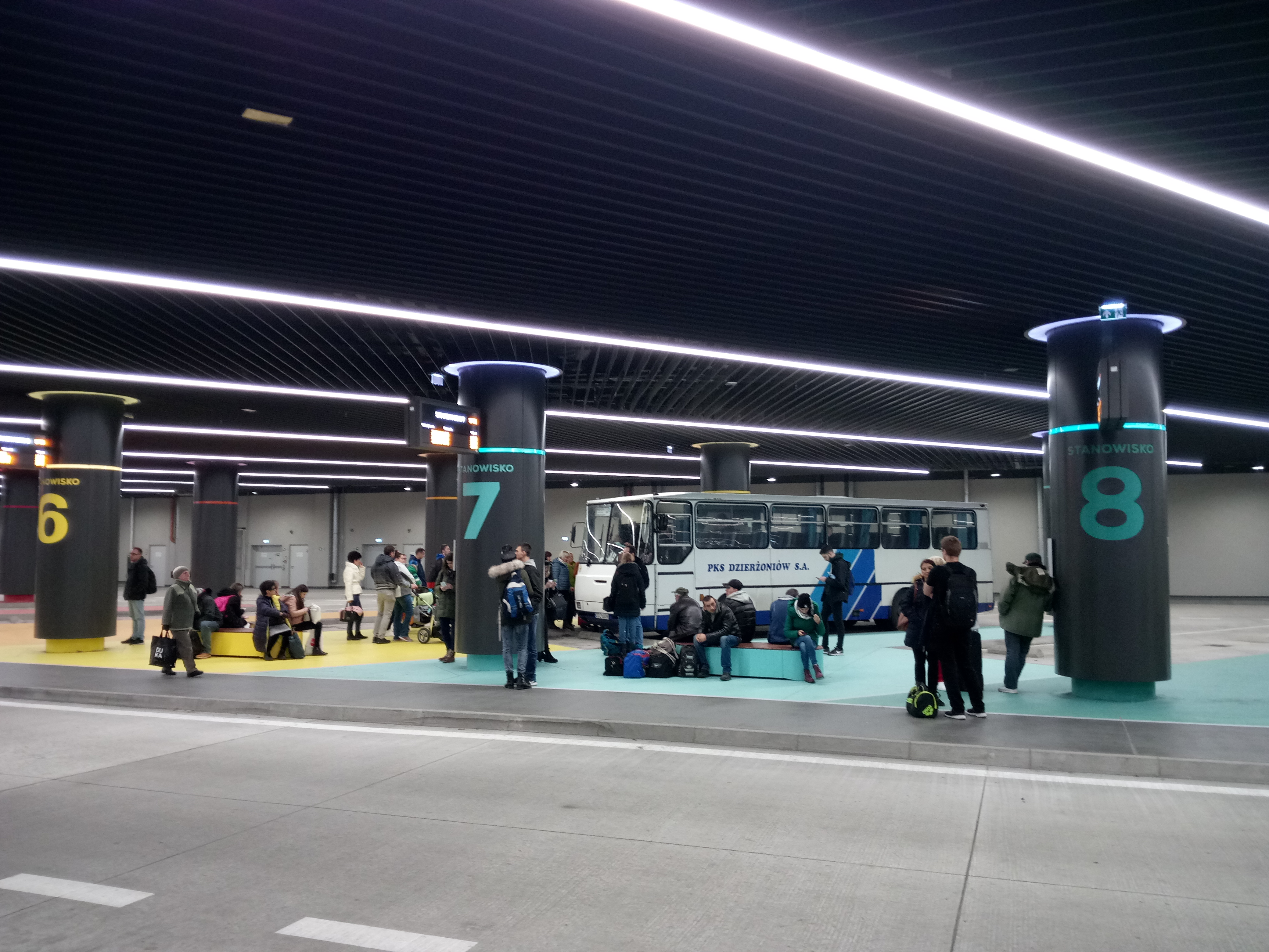 autobus PKS Dzierżoniów na Dworcu Wrocław (2017)